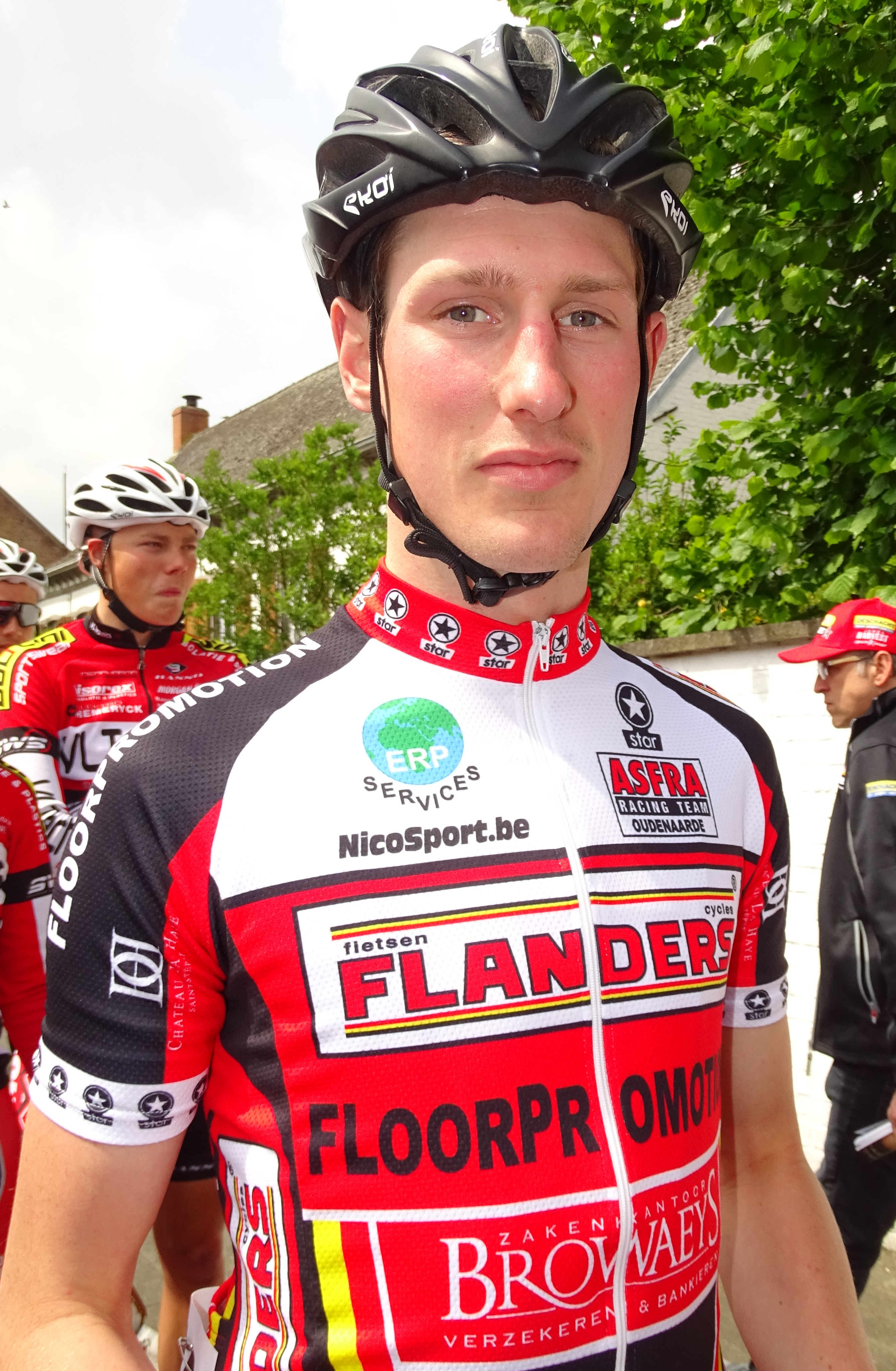 Reportage réalisé le dimanche 17 mai à l'occasion du départ du Grand Prix Criquielion 2015 à Silly, Belgique.